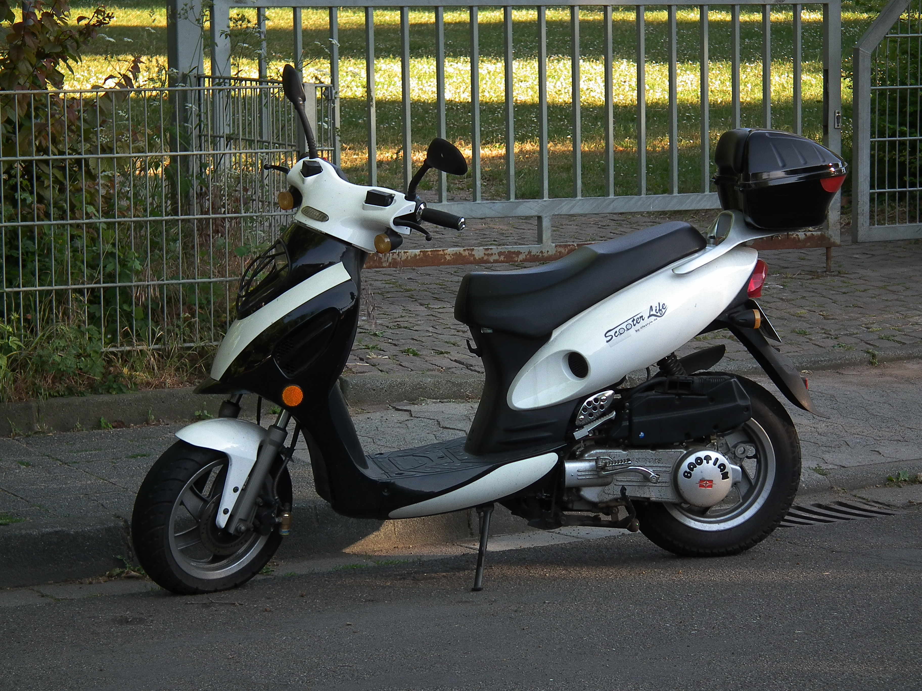 Baotian Scooter Lifestyle, fotografiert in Heidelberg (Baden-Württemberg, Deutschland)